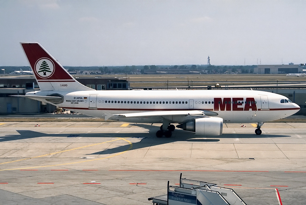 أحد الطائرات التابعة لطيران الشرق الأوسط (أحد شركات الطيران اللبنانية)، في لحظة هبوطها على الأراضي الالمانية